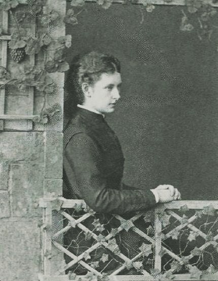 Екатерина Петровна Клейнмихель, ур. княжна Мещерская (09.07.1843—27.03.1925).